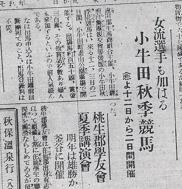 昭和6年9月6日の河北新報記事です。小牛田で行われる花競馬についての記事をピックアップしました。Im 6. Jahr, 9. Monat und 6. Tag der Periode Showa, Nachricht in der Kobe-Zeitung